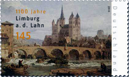 Sonderbriefmarke, 1100 Jahre Limburg an der Lahn